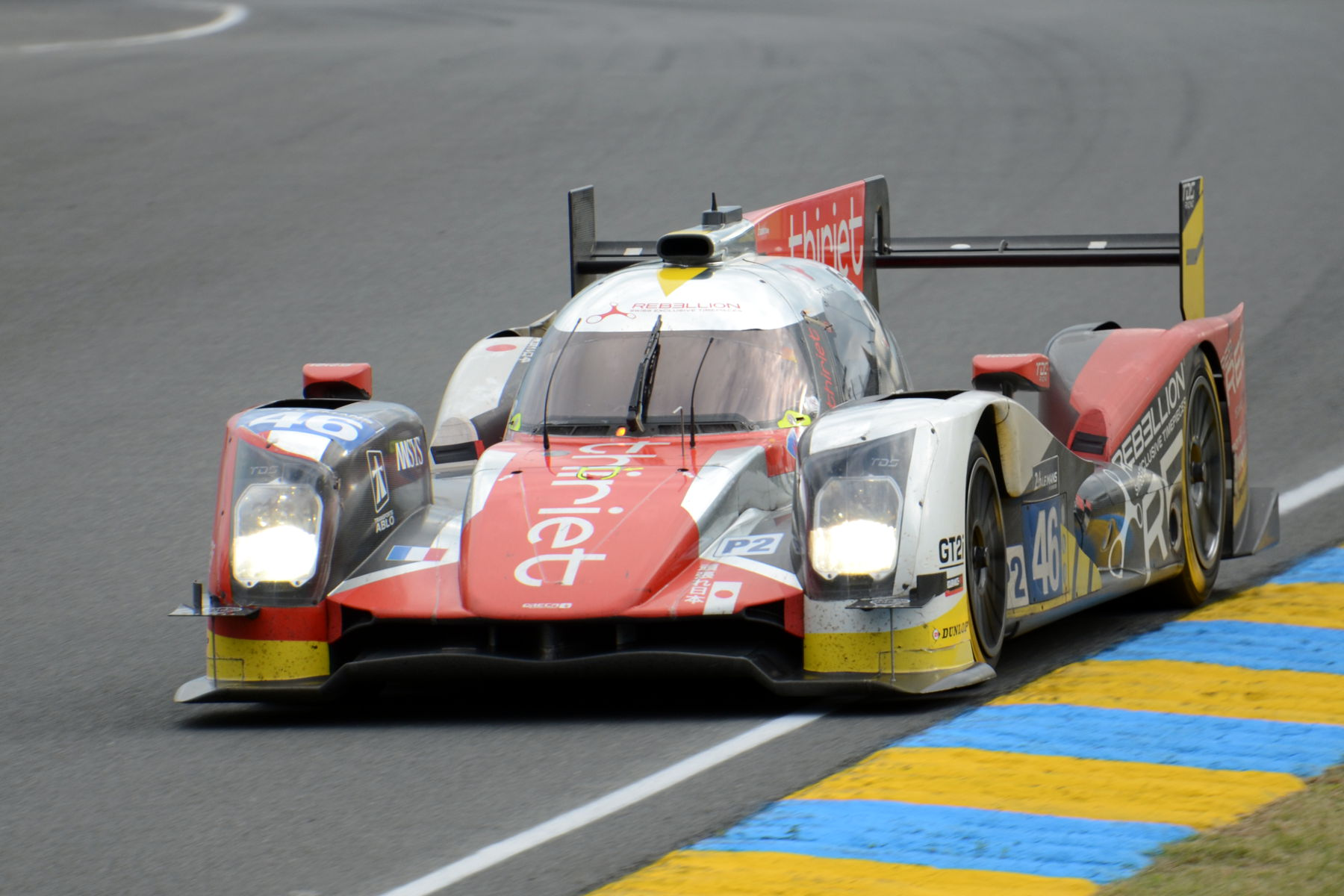 L'Oreca 05 - Nissan de l'écurie Thiriet par TDS Racing pilotée par Pierre Thiriet, Mathias Beche et Ryo Hirakawa lors des 24 Heures du Mans 2016